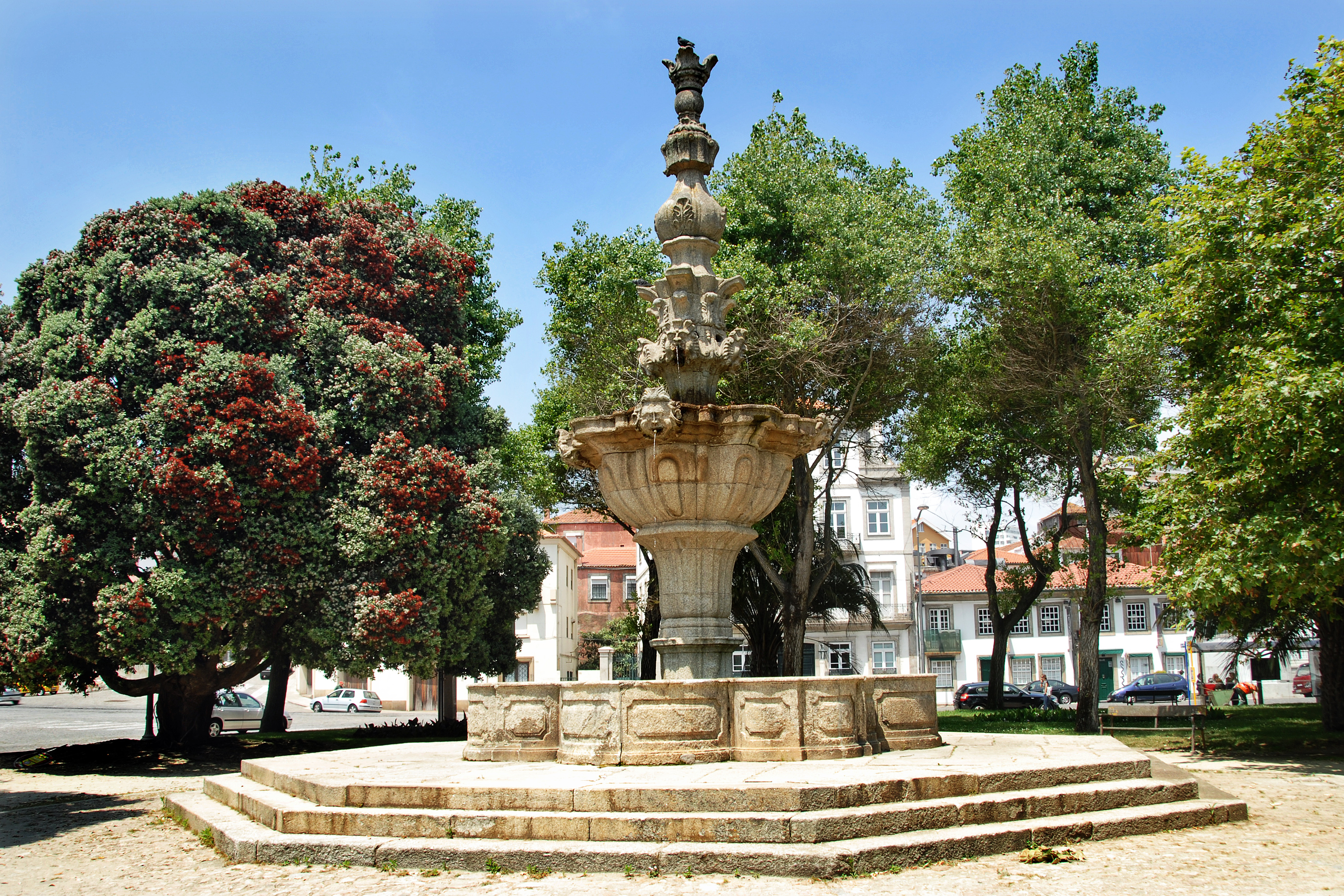 Chafariz do Passeio Alegre This file was uploaded for Wiki Loves Monuments in Portugal with the unique identifier 70686.